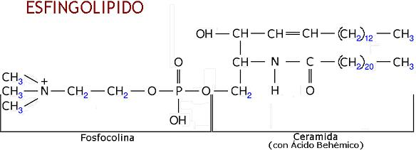 Ejemplo de Esfingolipido